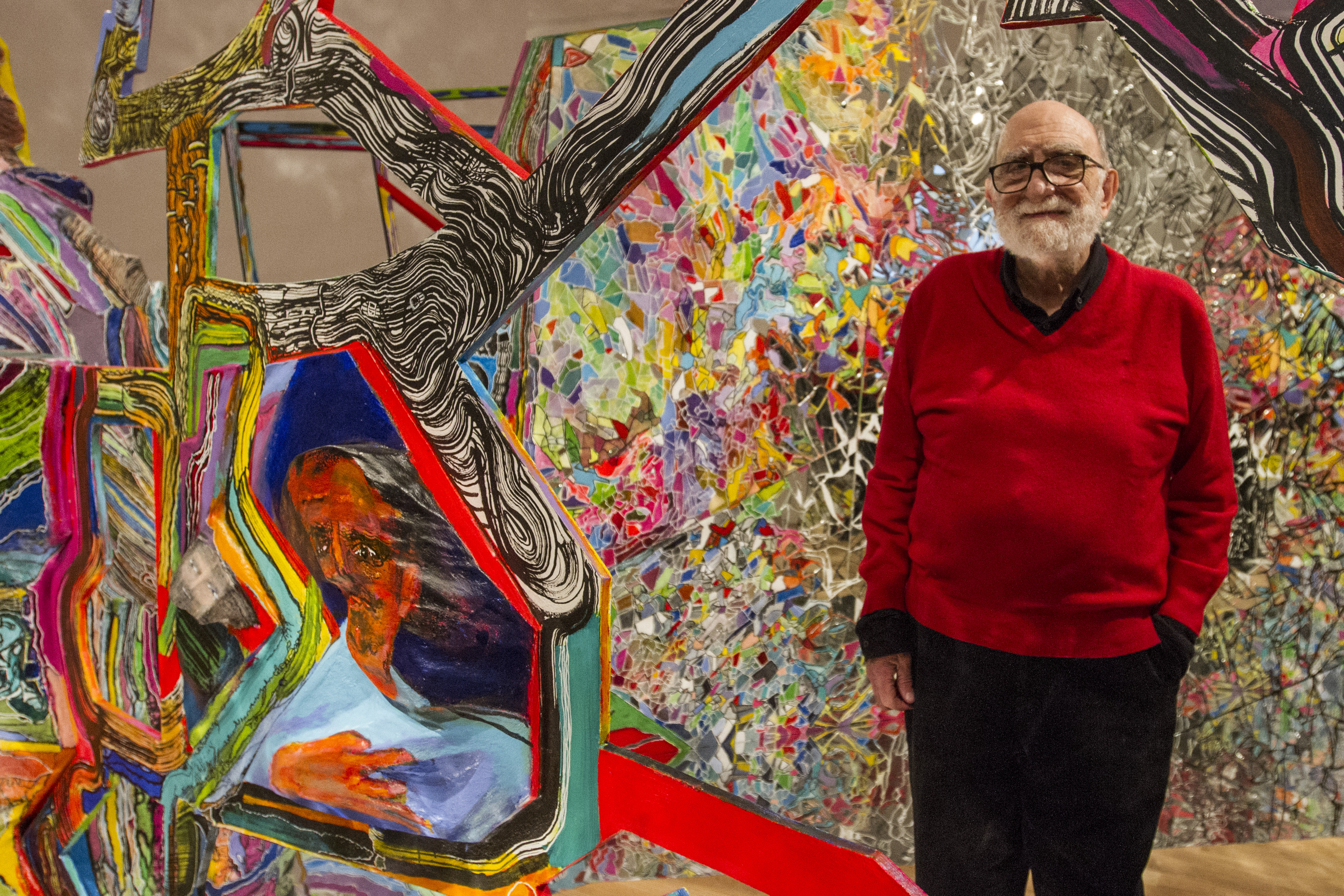 Buenos Aires, 10 de Julio de 2017. El Museo Nacional de Bellas Artes inauguró la muestra del Luis Felipe Noé "Mirada prospectiva"Esta vez el MNBA reúne pinturas, dibujos e instalaciones realizados durante sesenta años (1957-2017). En la presentación a la prensa estuvieron presentes el director del Museo Nacional de Bellas Artes, Andres Duprat; el artista Luis Felipe Noé; la curadora de la muestra, Cecilia Ivanchevich, entre otros funcionarios e invitados.